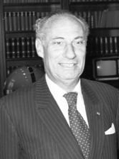 Title: Bonn, Carstens mit Botschafter Weil Extra information: Von rechts: Karl Carstens, Herbert Weil People in the image: Carstens, Karl Prof. Dr.: Bundespräsident, MdB, CDU, Bundestagspräsident, Staatssekretär Auswärtiges Amt, Bundesrepublik Deutschland * Weil, Herbert: Botschafter in Ghana, Bundesrepublik Deutschland# Factual corrections and alternative descriptions are encouraged separately from the original description. Additionally errors can be reported at this page to inform the Bundesarchiv. Original historic description: Bundespräsident Carl Carstens empfängt Botschafter Herbert Weil (Gahna) im Bundespräsidialamt.